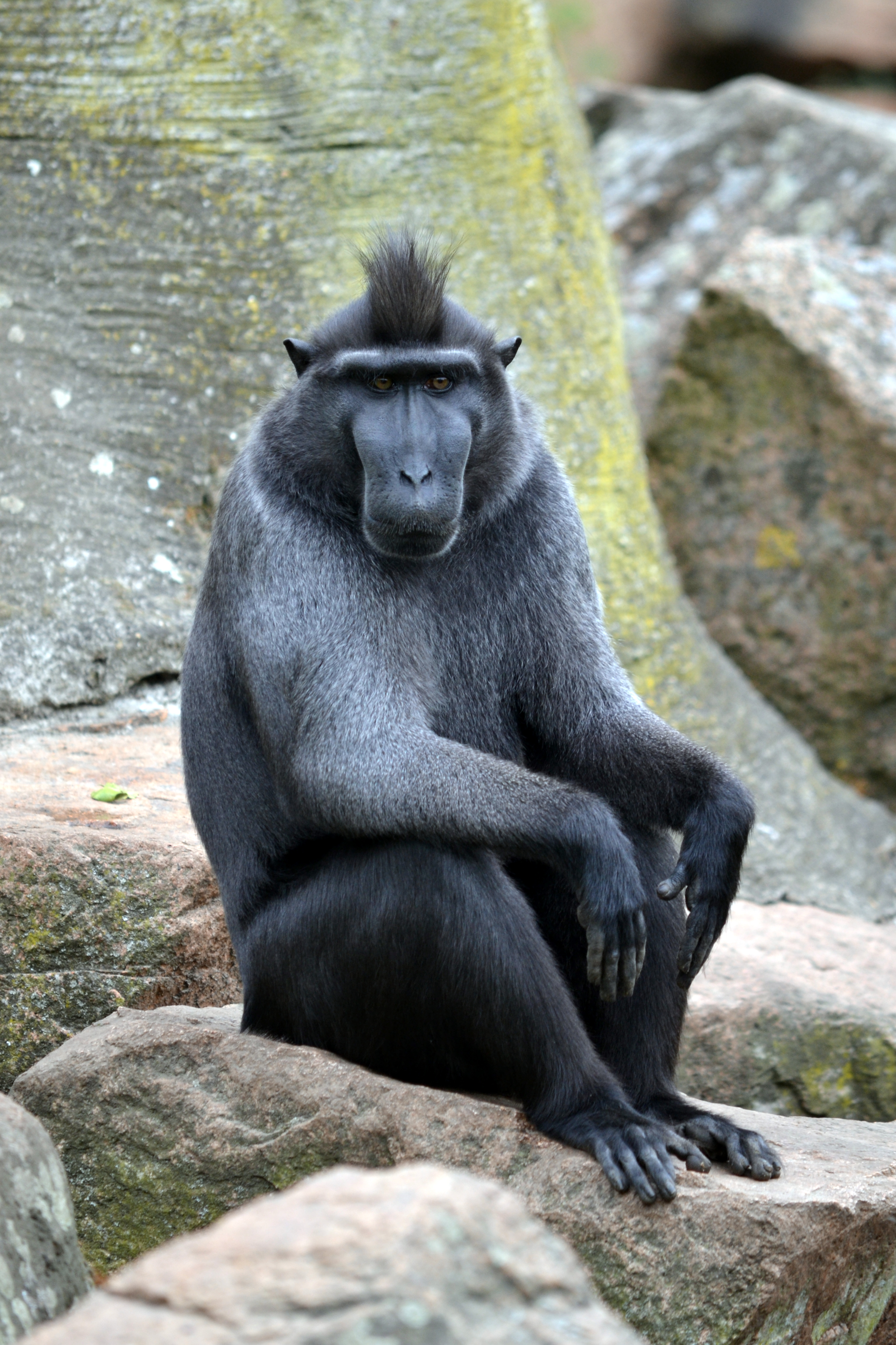 Deze foto is gemaakt in Diergaarde Blijdorp (Rotterdam). This picture was taken at Rotterdam Zoo (Rotterdam).